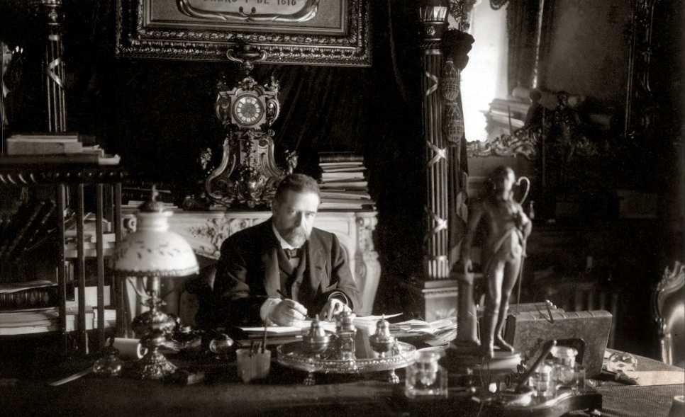 Germán Riesco Errázuriz (Rancagua, 28 de mayo de 1854 - Santiago, 8 de diciembre de 1916). Presidente de Chile. Sobrino del Presidente Federico Errázuriz Zañartu y primo, además de cuñado, del Presidente Federico Errázuriz Echaurren.